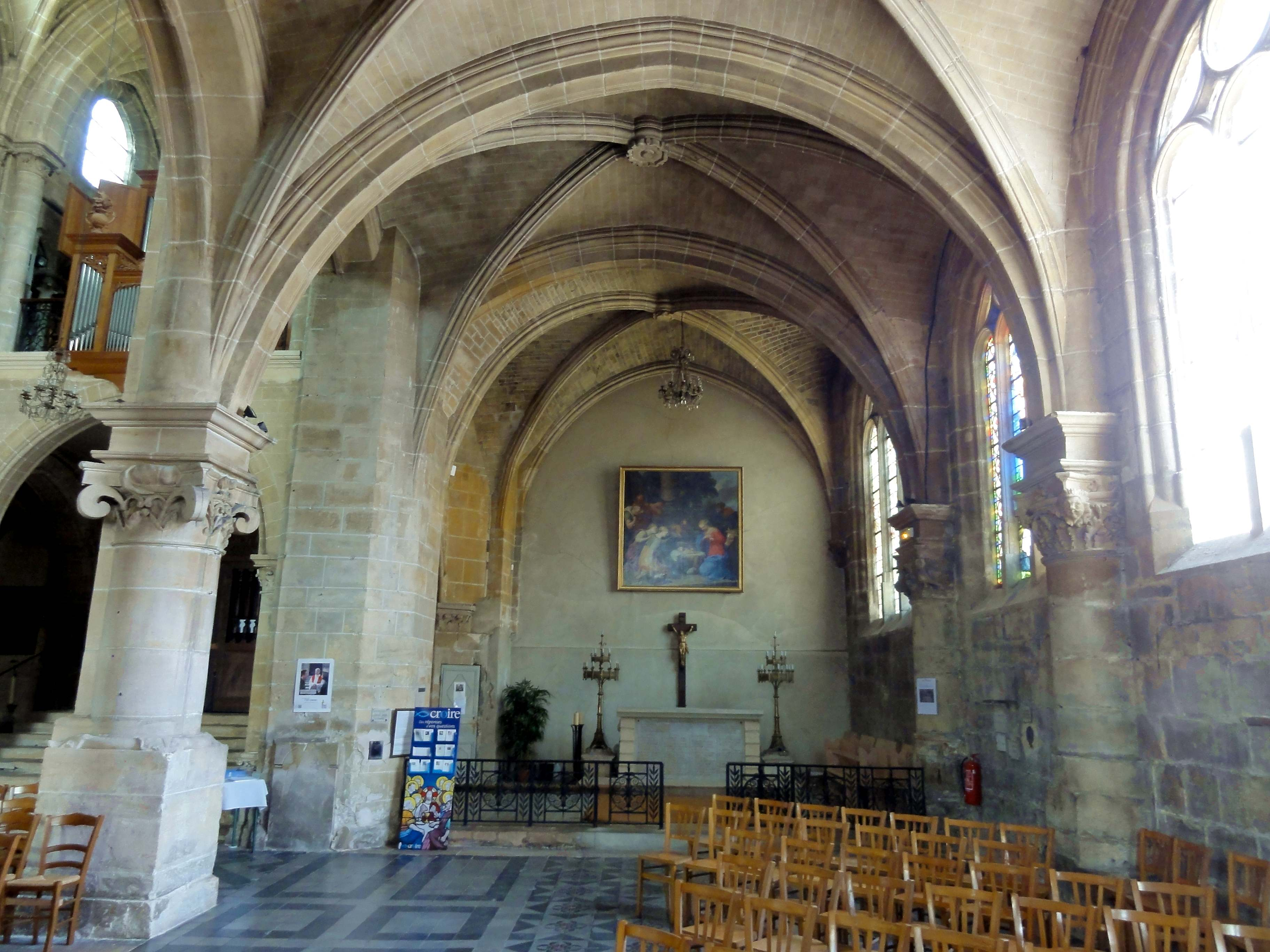 Intérieur de l'église - voir titre.